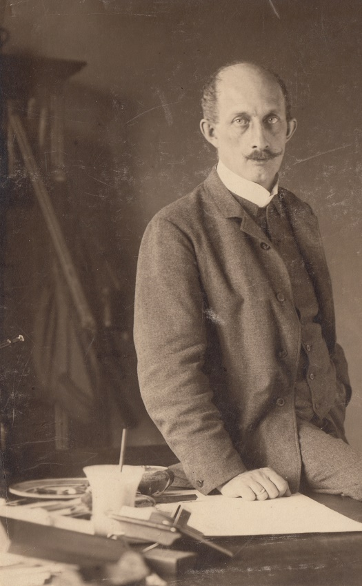 Wilhelm Kricheldorff Hermann Loens am Schreibtisch. Hinweis: Kricheldorffs Ölporträt ist aus dem Jahr 1909, das Foto kann in diesem Zusammenhang aufgenommen worden sein.